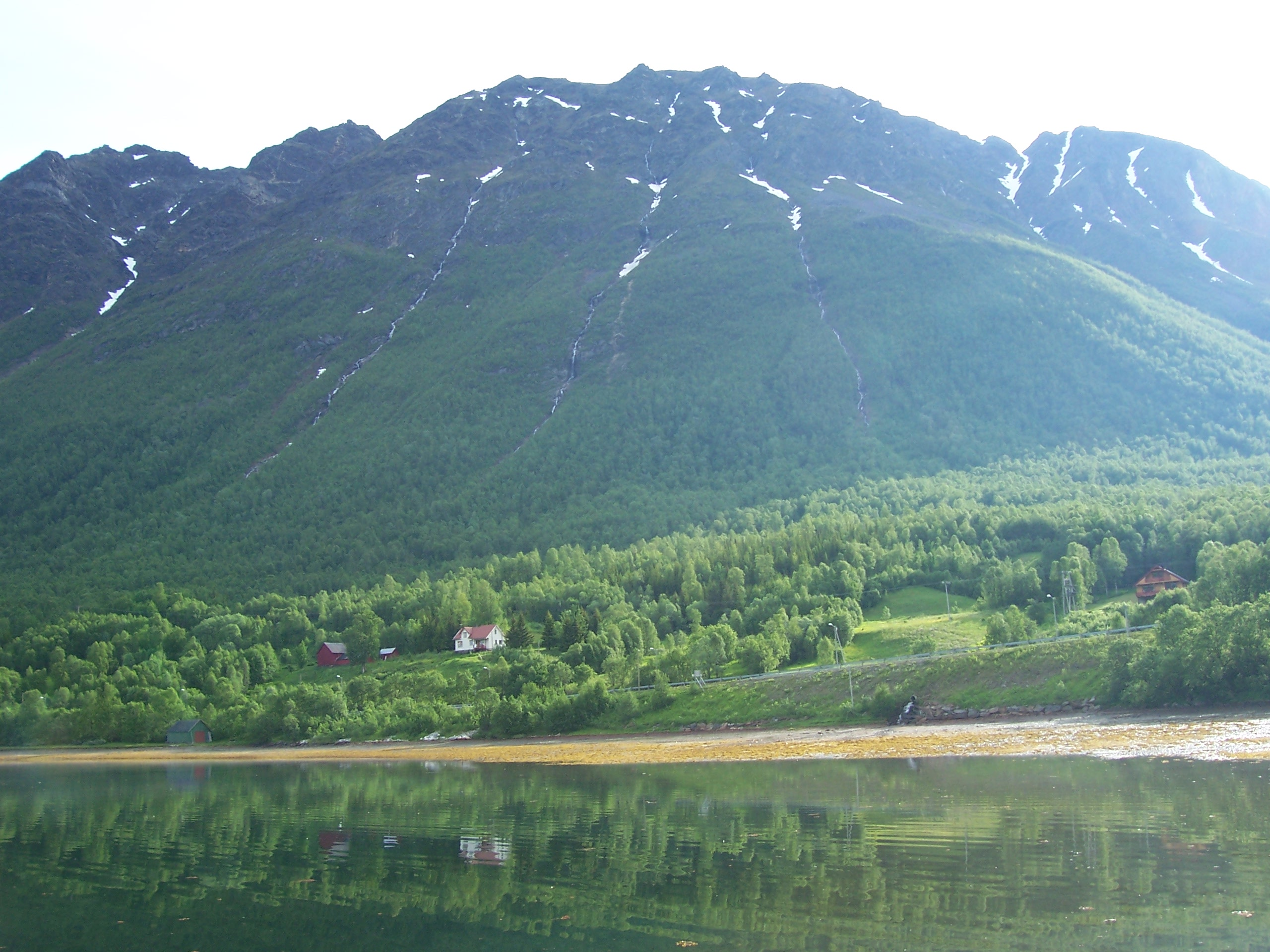 Sørbotn in the end of Ramfjorden near Tromsø